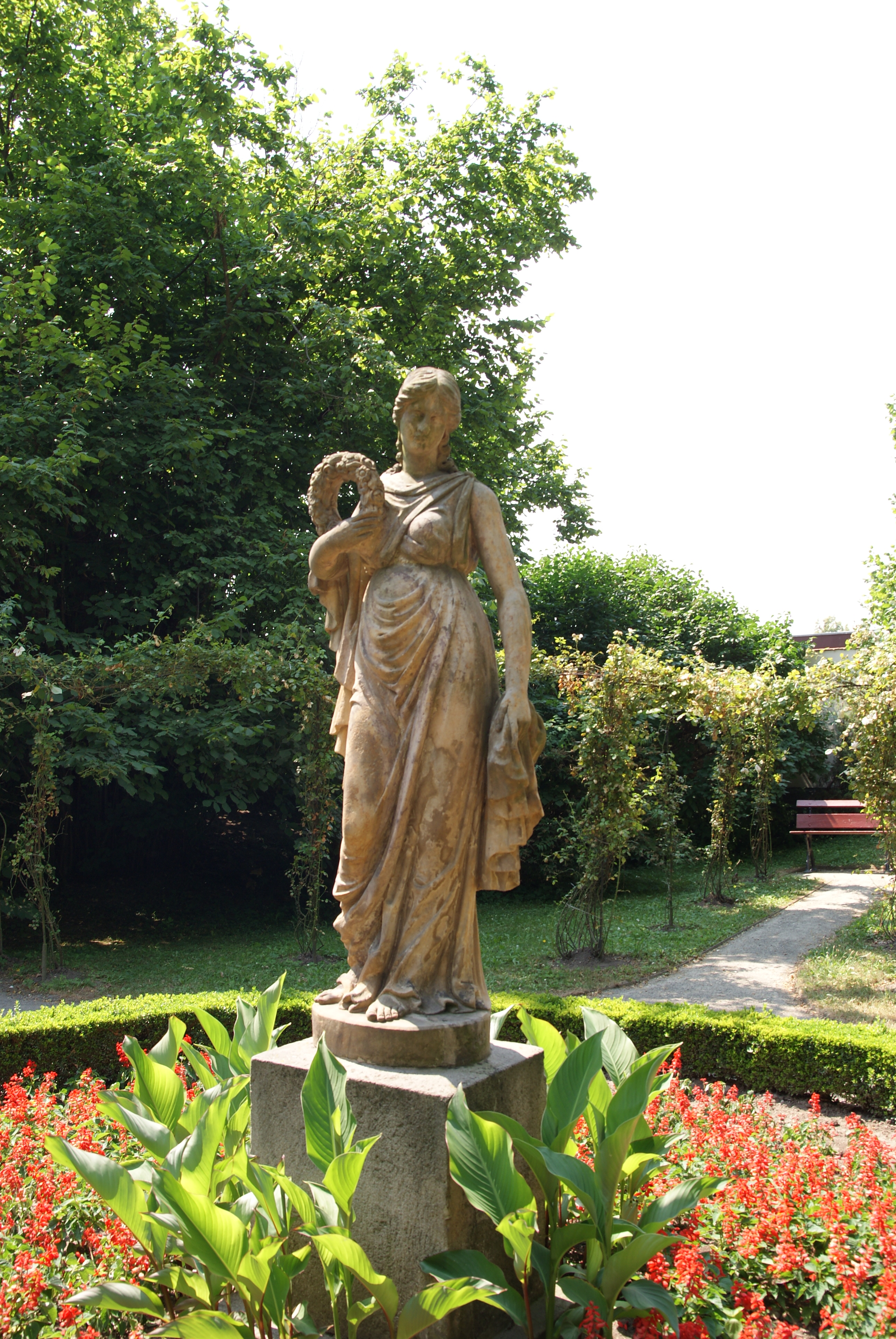 Zámek Kroměříž, nám. Sněmovní, též ZSJ Podzámecká zahrada 1/2, Kroměříž